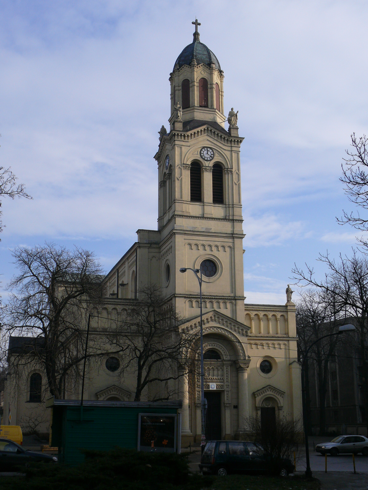 Kościół Podwyższenia Św. Krzyża w Łodzi.